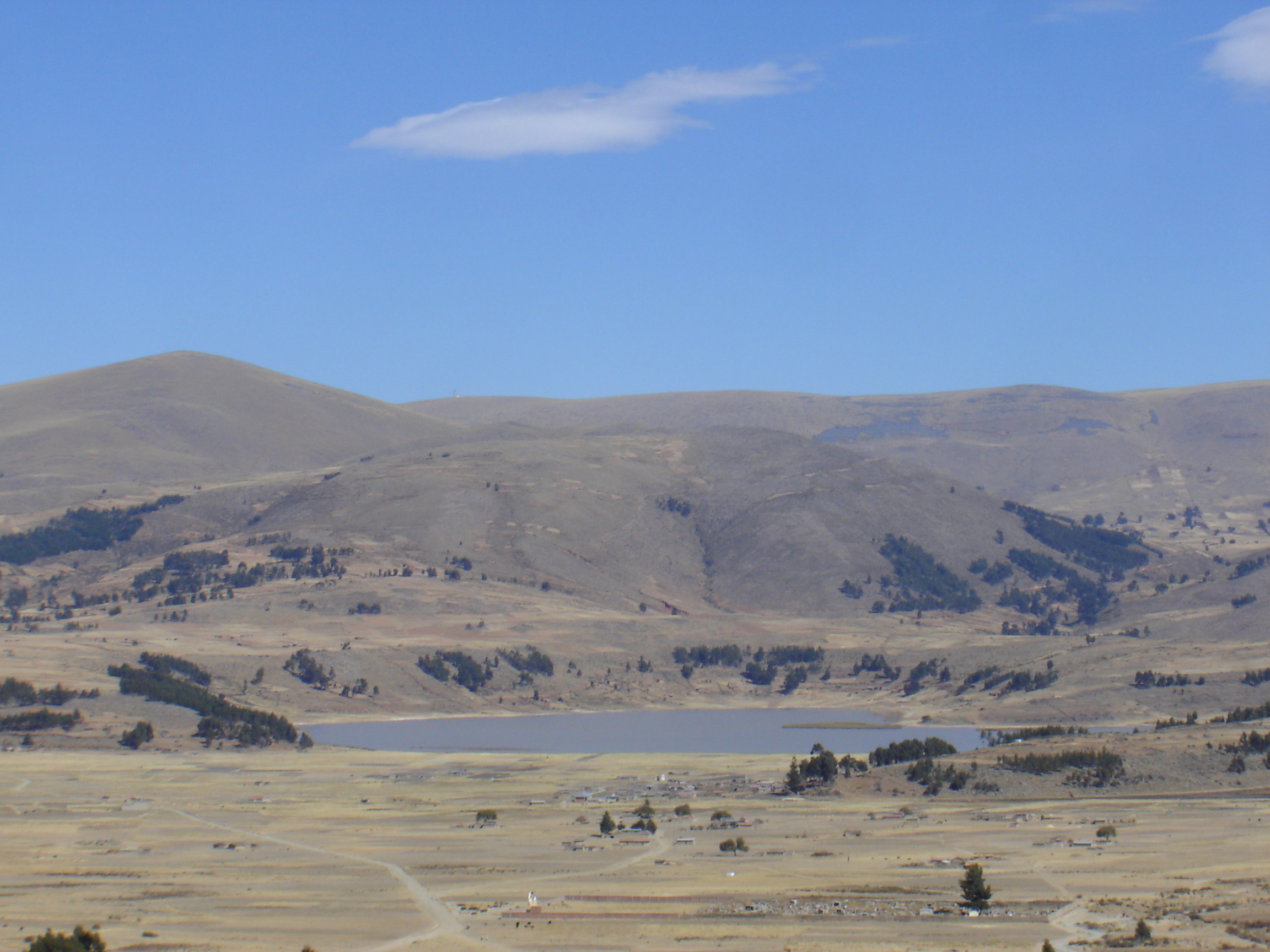 La laguna Qullpaqucha, se encuentra al sud de la Población de Vacas